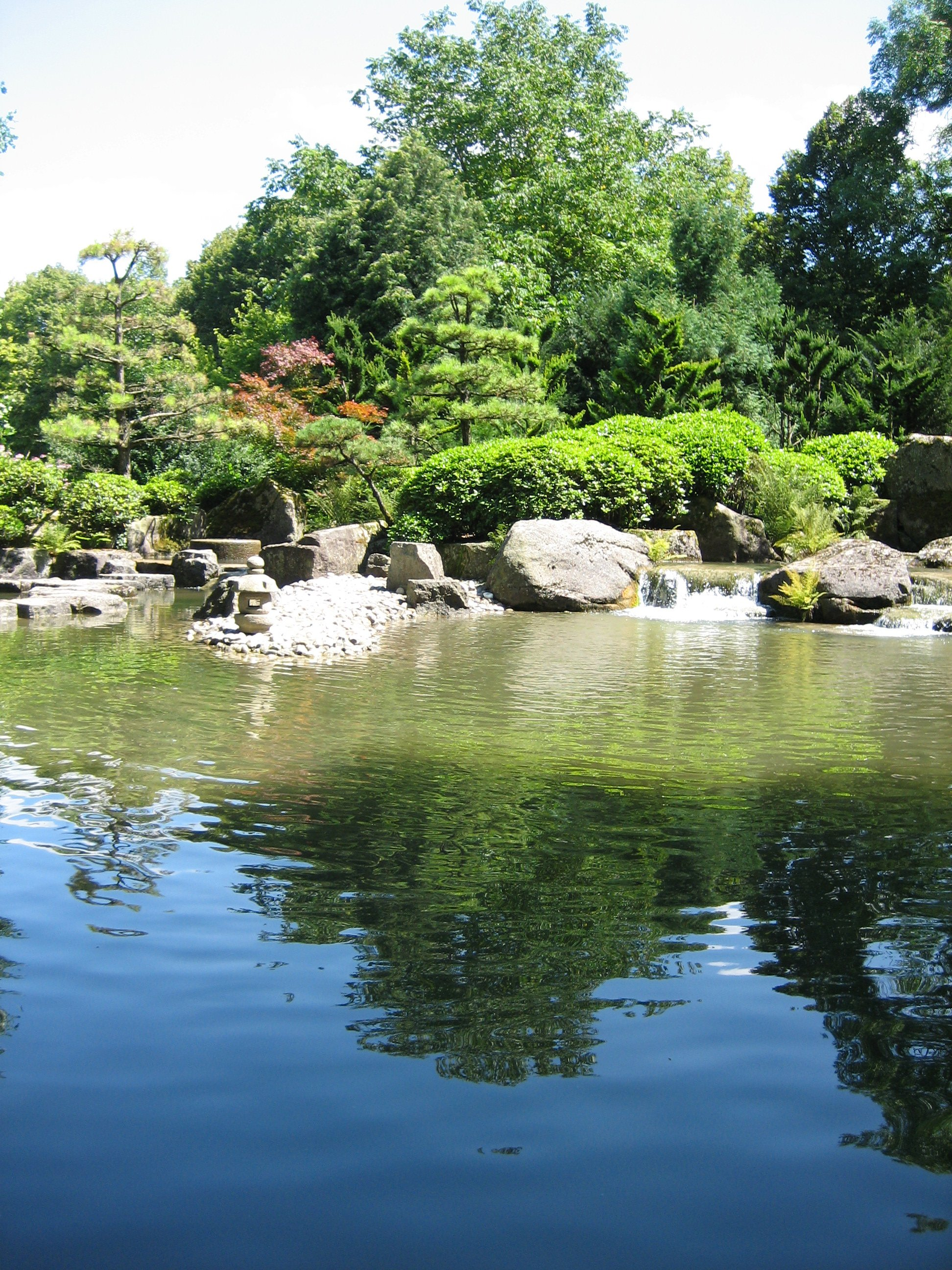 Botanischer Garten in Augsburg, Teilansicht des Teiches im Japangarten